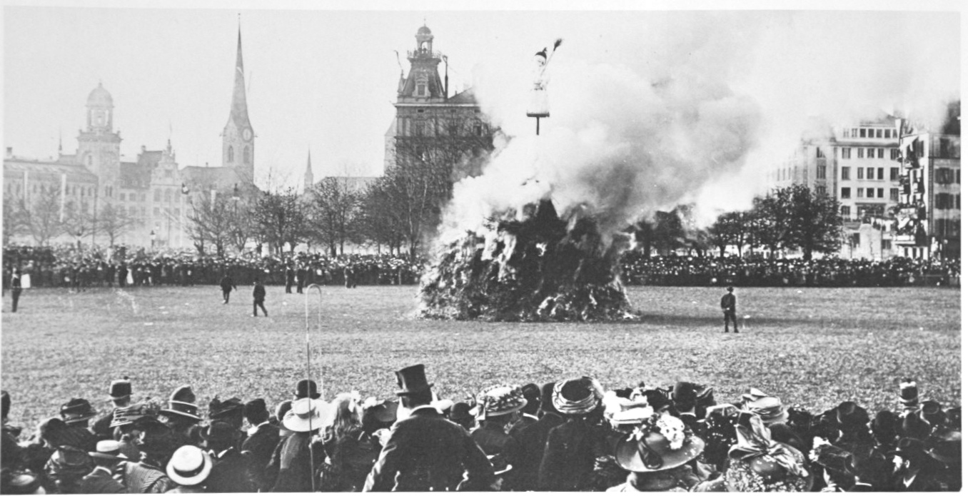 Sechseläuten Sechseläutenumzug 1910